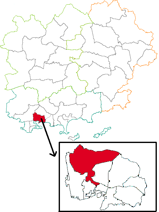 Situation du canton dans la département du Var (83), France